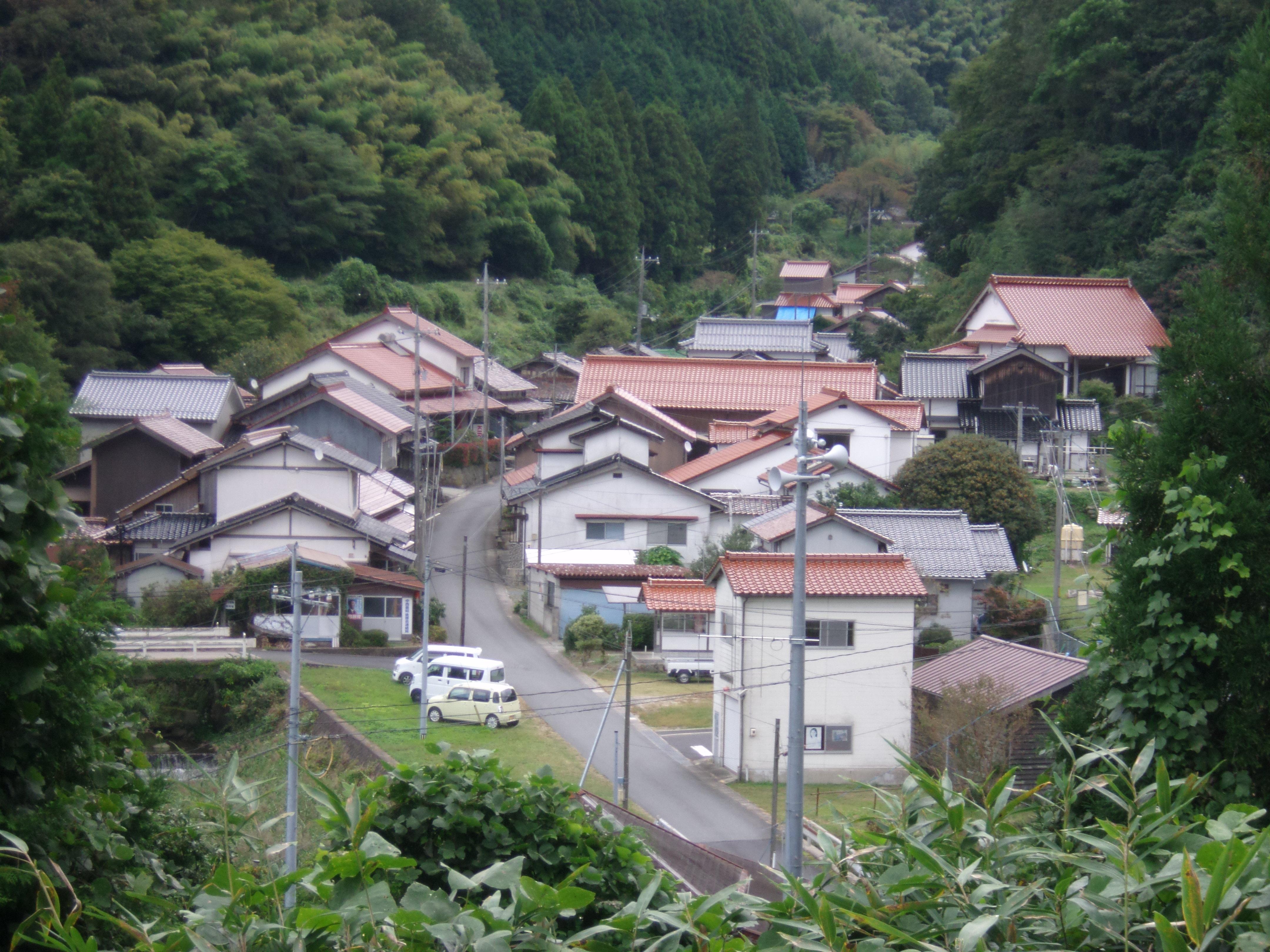 世界遺産「石見銀山」の構成資産である銀山街道温泉津沖泊道 西田集落